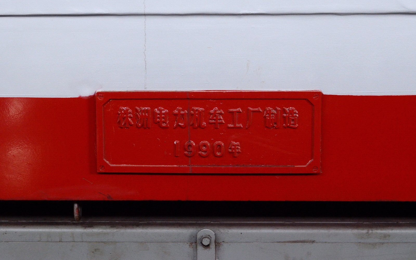 韶山5型0001号机车的制造厂商铭牌